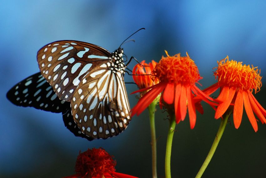 Tirumala septentrionis